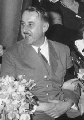 "Das Fest der deutschen Reise". Am Sonnabendabend fand in sämtlichen Festsälen des Berliner Zoo das "Fest der deutschen Reise", das die grossen Verkehrsorganisationen veranstalteten und das für Reise und Erholung für alle Volksgenossen warb, statt. Trachtenabordnungen aus sämtlichen deutschen Gauen waren eingetroffen und boten ein farbenfrohes, buntes Bild. Der bayrische Staatsminister Esser, der Vorsitzende des Bundes deutscher Verkehrsvereine und Bäder, inmitten einer Gruppe entzückender Wiesbadener Blumenmädchen. Text ohne Gewähr! Scherls Bilderdienst, Berlin SW 68.